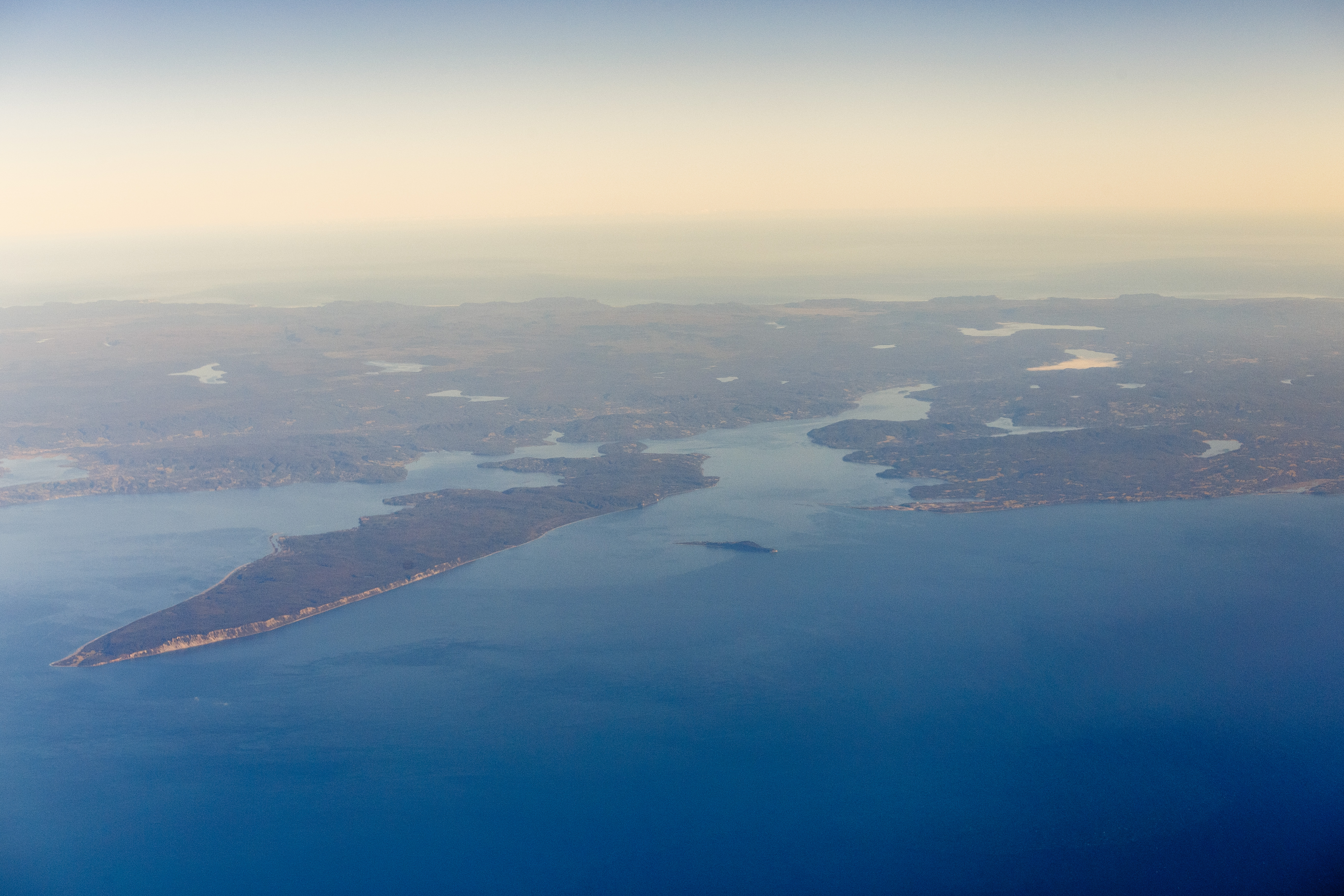 Islas Tranqui y Acui, comuna de Queilen, Chiloé, Chile.